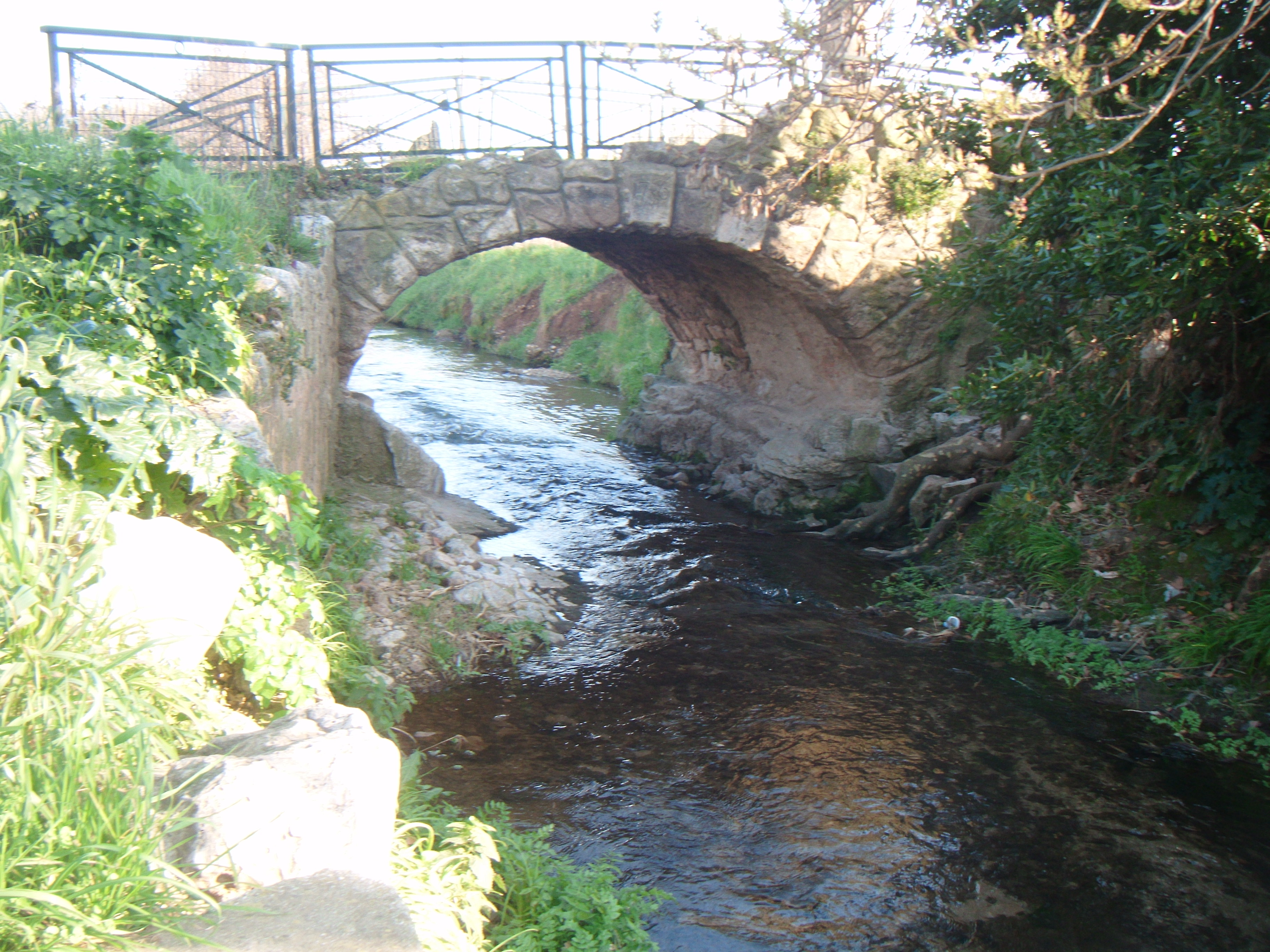 Le Roubaud; Petit pont datant de 1736